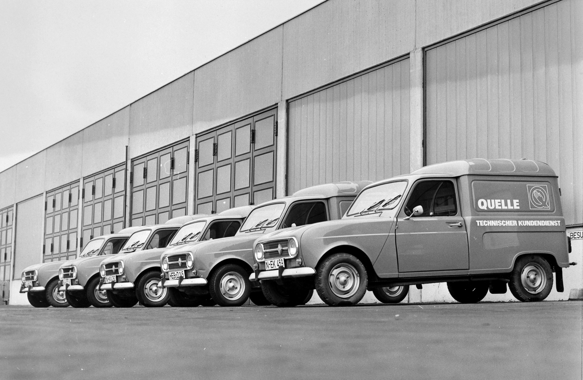 Die Fahrzeugflotte des ehemaligen technischen Kundendienstes der Quelle - heute Profectis